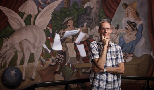 פרופסור למתמטיקה נוגה אלון